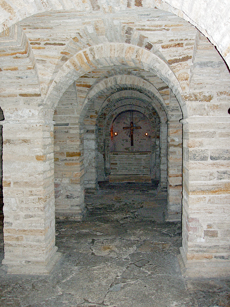 Kryptkirken under Vor Frue Kirke er den ældste del af kirken - Påbegyndt omkring 1060. Denhar været tilmuret og glemt, men blev genfundet i 1955, og restaureret året efter.